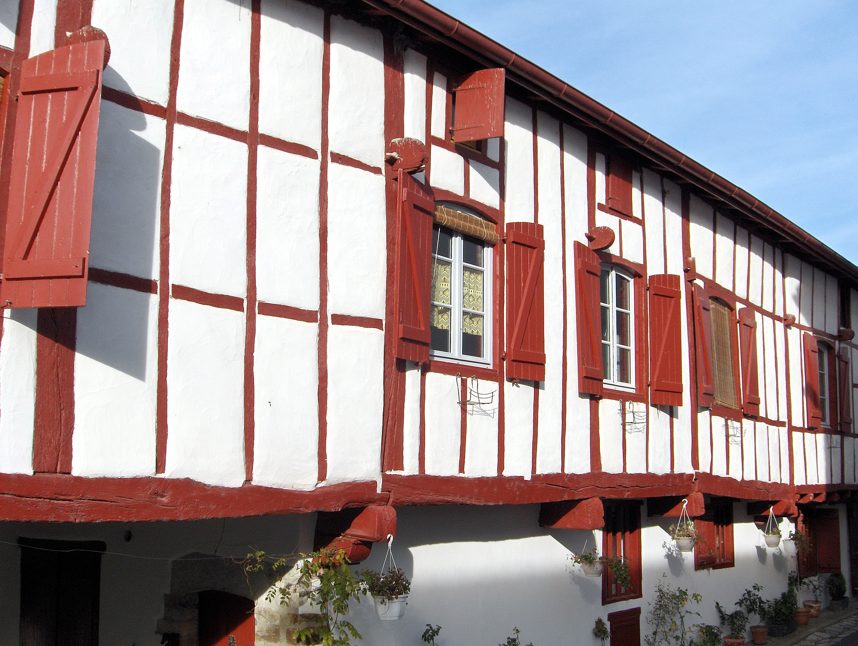 Photo de La Bastide-Clairence, Pyrénées-Atlantiques, France. Photo prise par Jibi44 en janvier 2007.